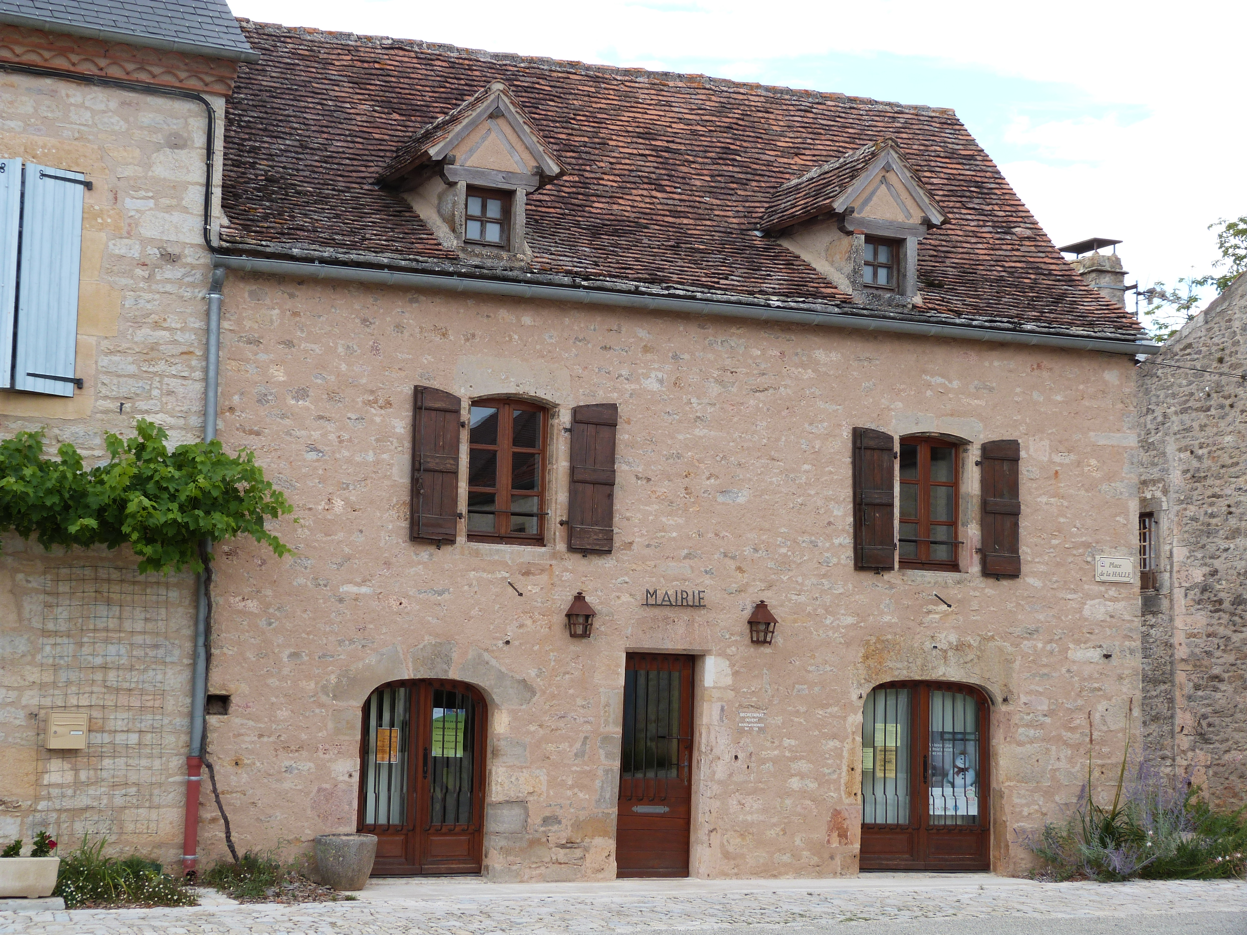 Cette mairie est située sur la place de la Halle, face à cette dernière.